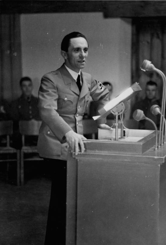 Kreisleitertagung auf der Ordensburg Vogelsang vom 22.-29.04.1937